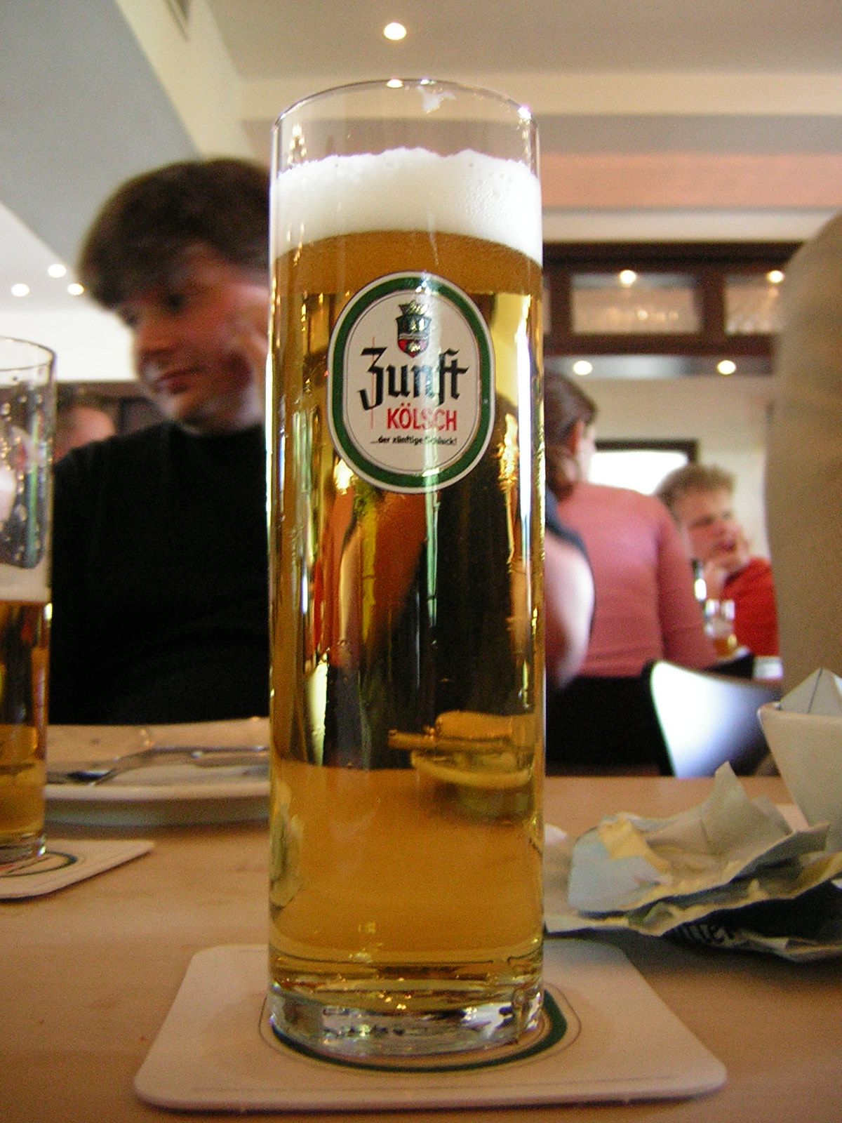 Kölsch (Bier) von der Erzquell Brauerei